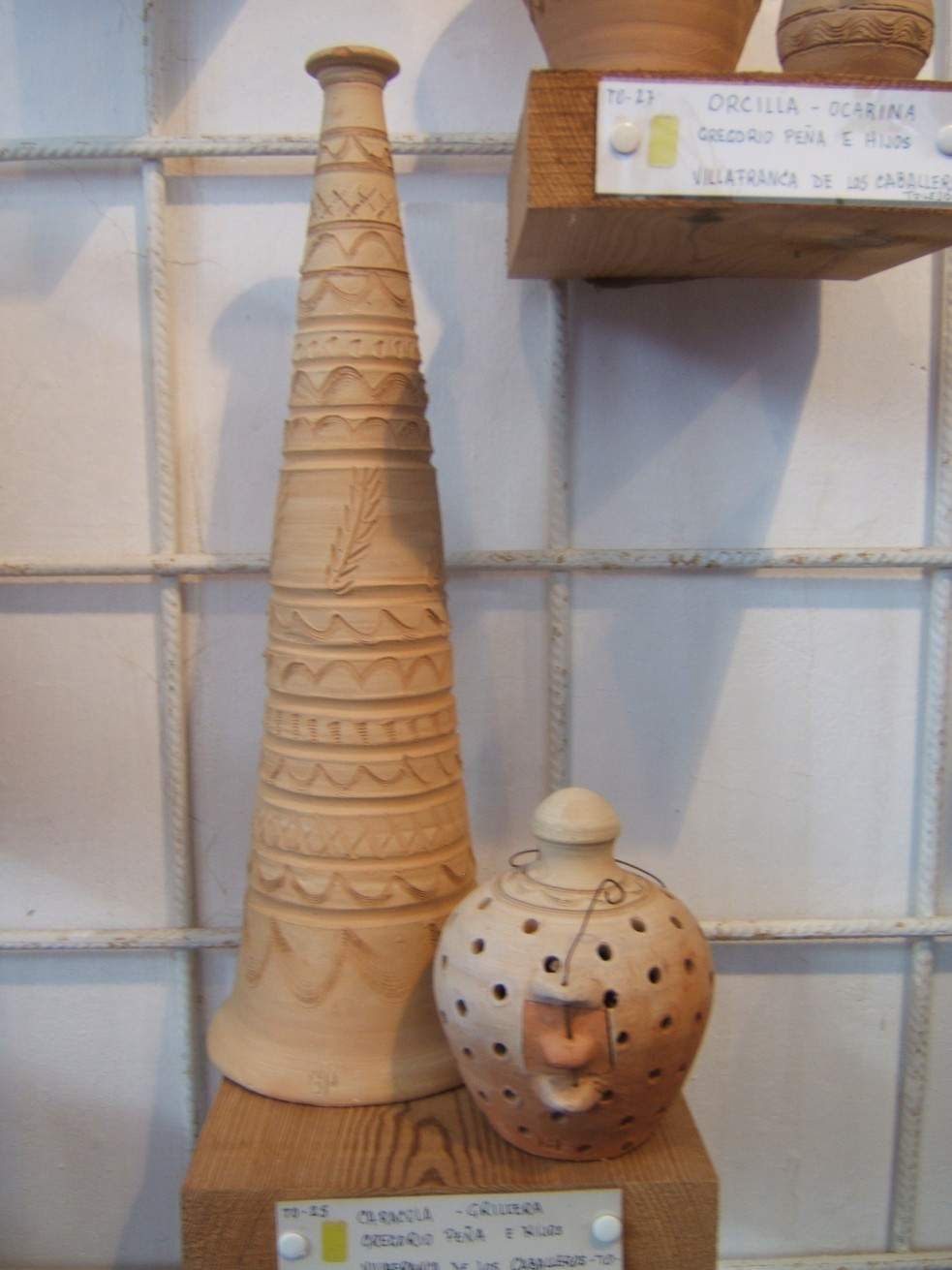 Dos ejemplos de la curiosa alfarería 'musical' de arcilla blanca de Villafranca de los Caballeros (Toledo, España). Una larga trompeta de barro y una pequeña grillera (para guardar grillos).